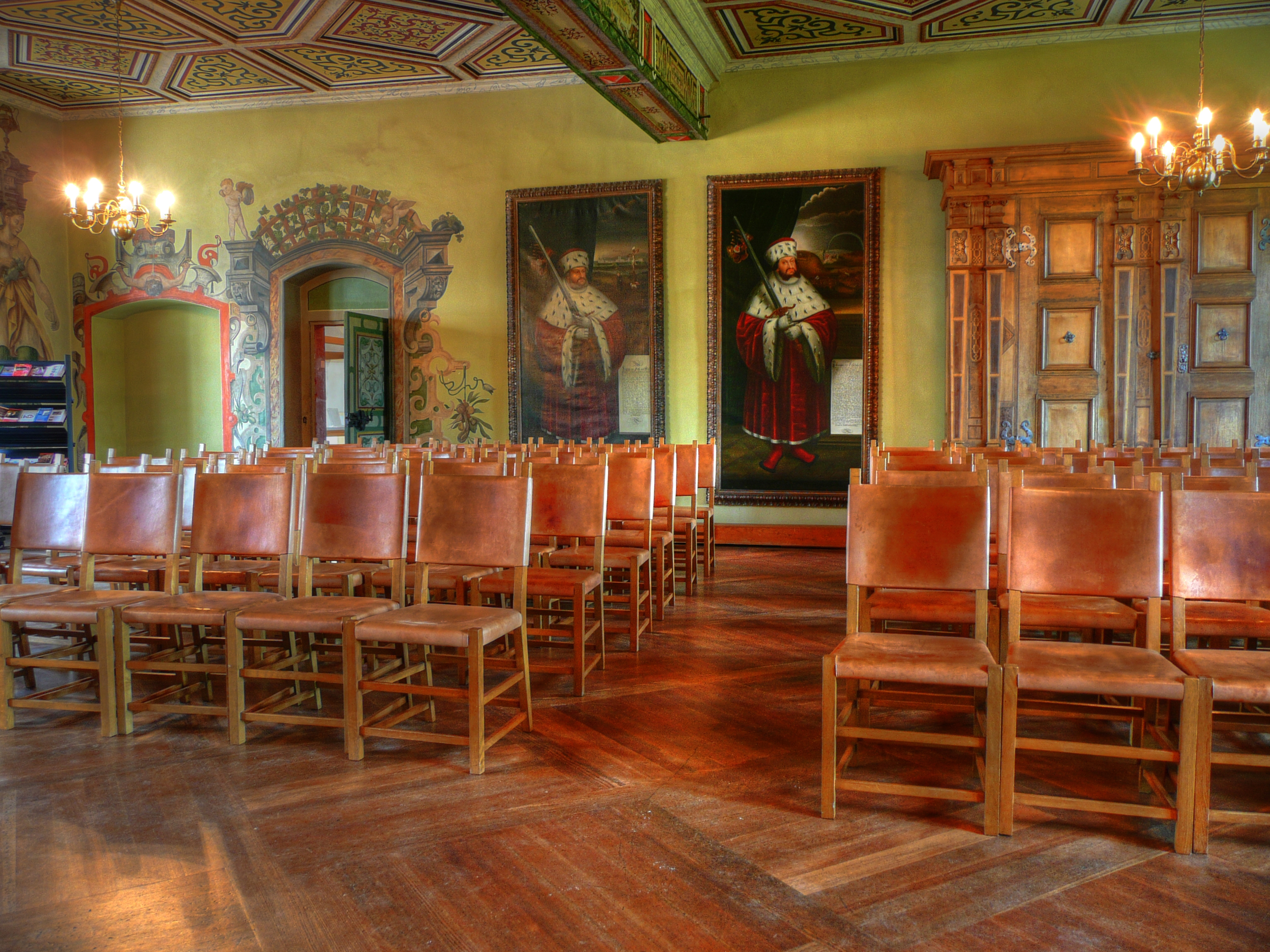 Festsaal auf Schloss Wilhelmsburg